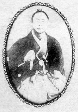 a Japanese man 清水谷公考 (Kinnaru Shimizudani)